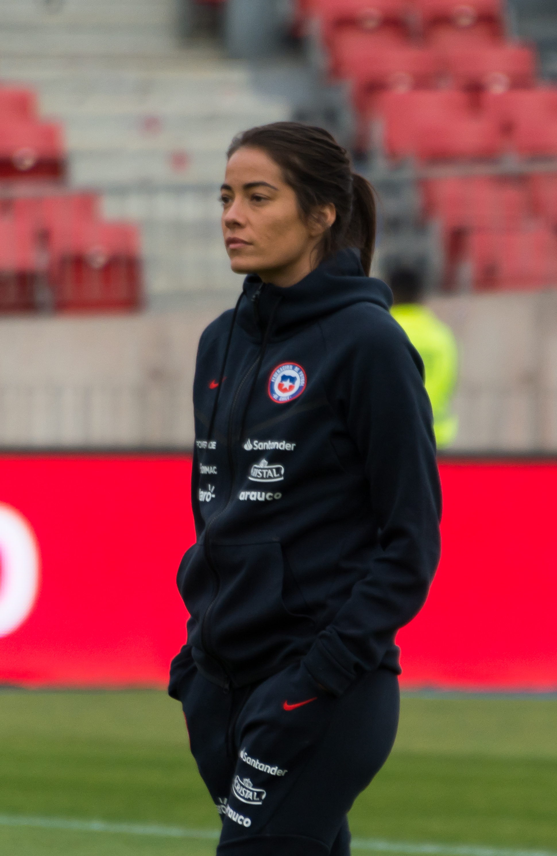 Ryann Torrero, Chile v Colombia, Estadio Nacional, Ñuñoa, Santiago, Chile.